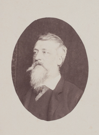 Claudius Popelin, buste ovale par Gustave Popelin.